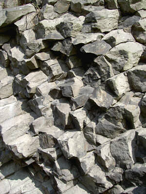 Basaltsäulen auf dem Parkstein in Nordbayern